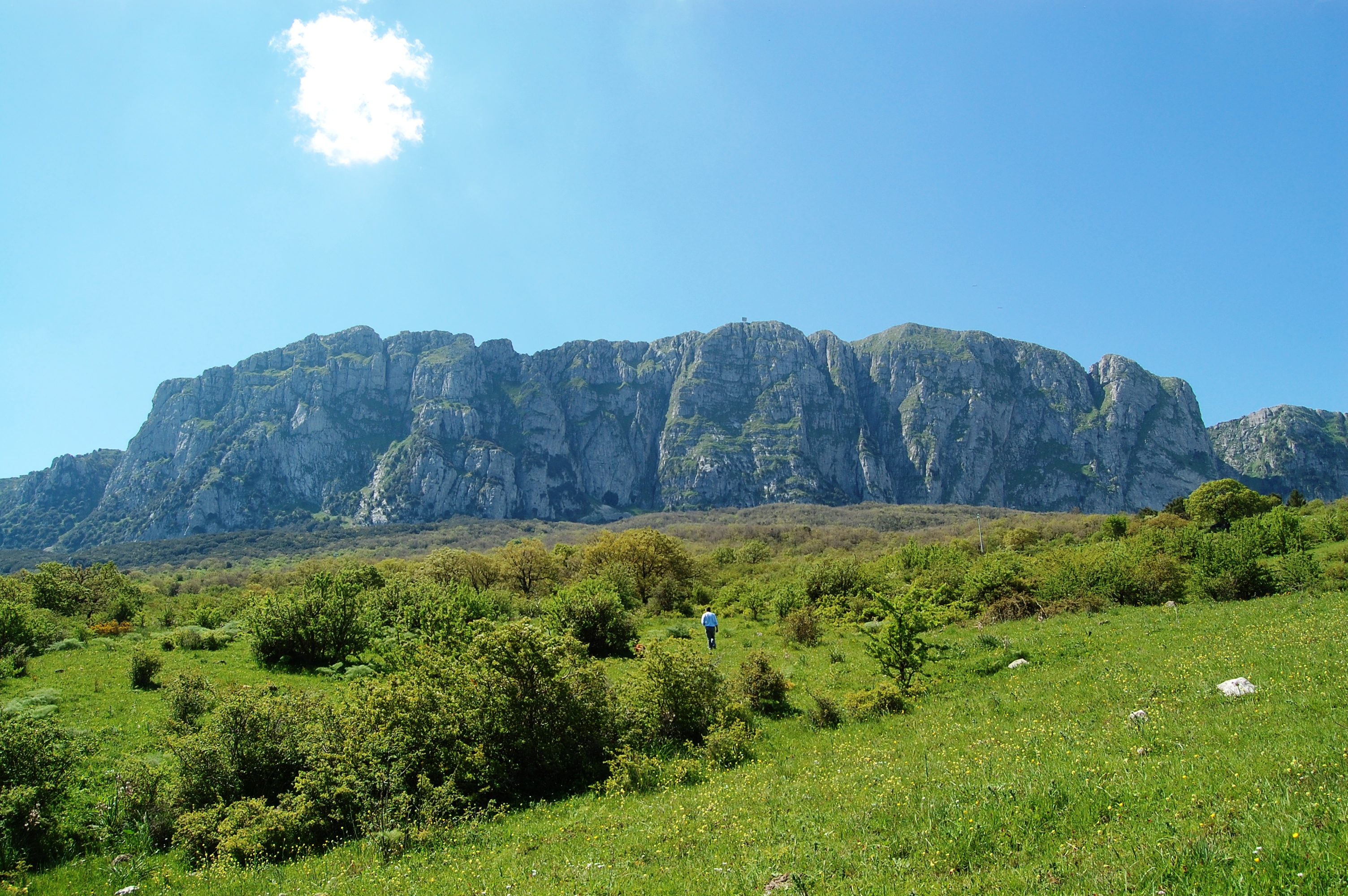 Bosco della Ficuzza, Sicily Rocca Busambra